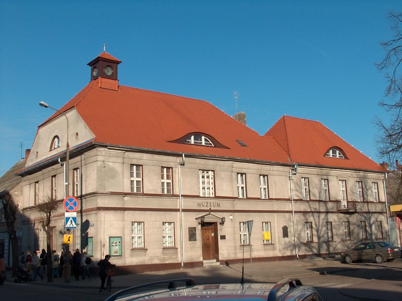 Ratusz - Muzeum Regionalne. Ratusz w Rogoźnie.